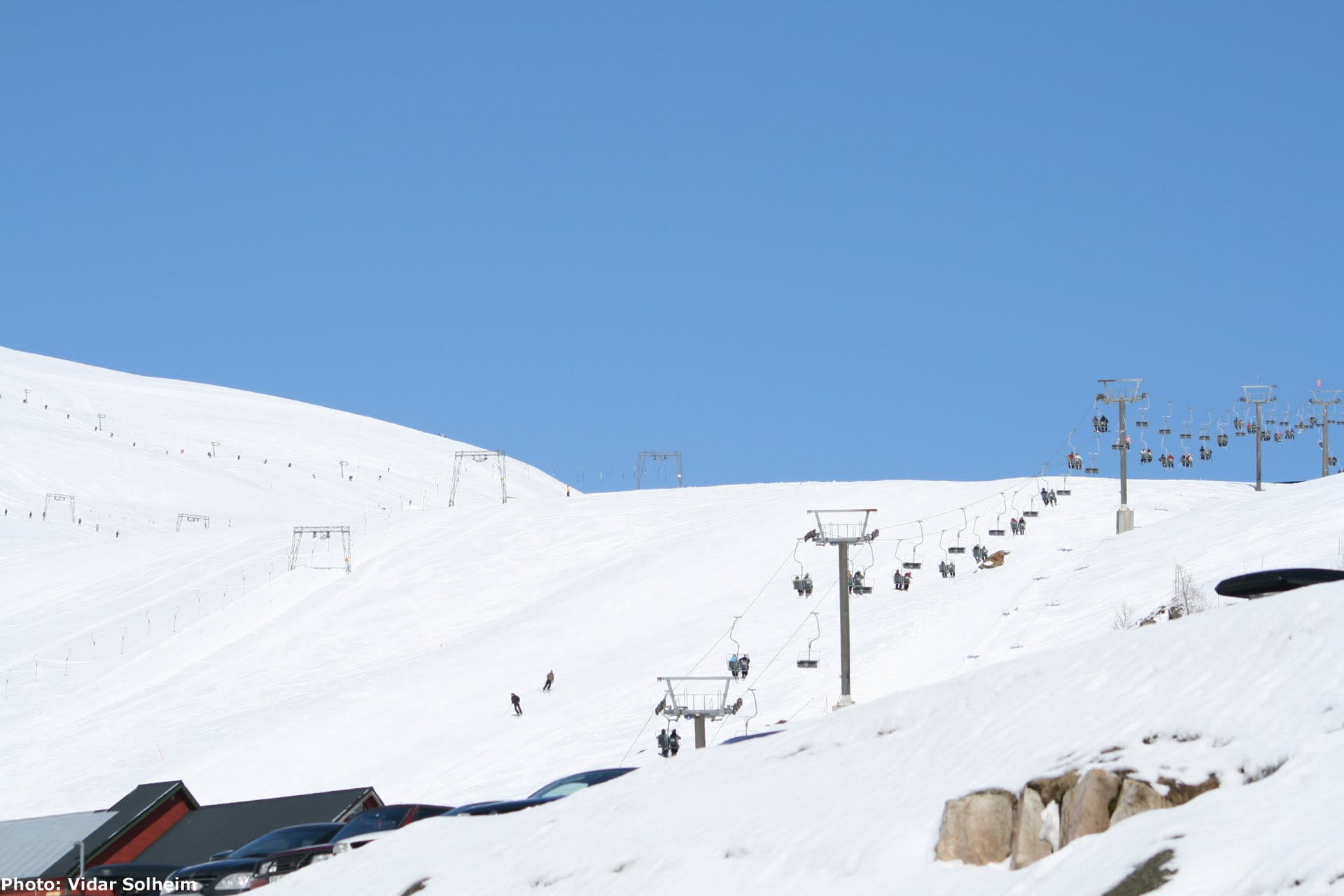 Røldal Skisenter, Foto: Vidar Solheim